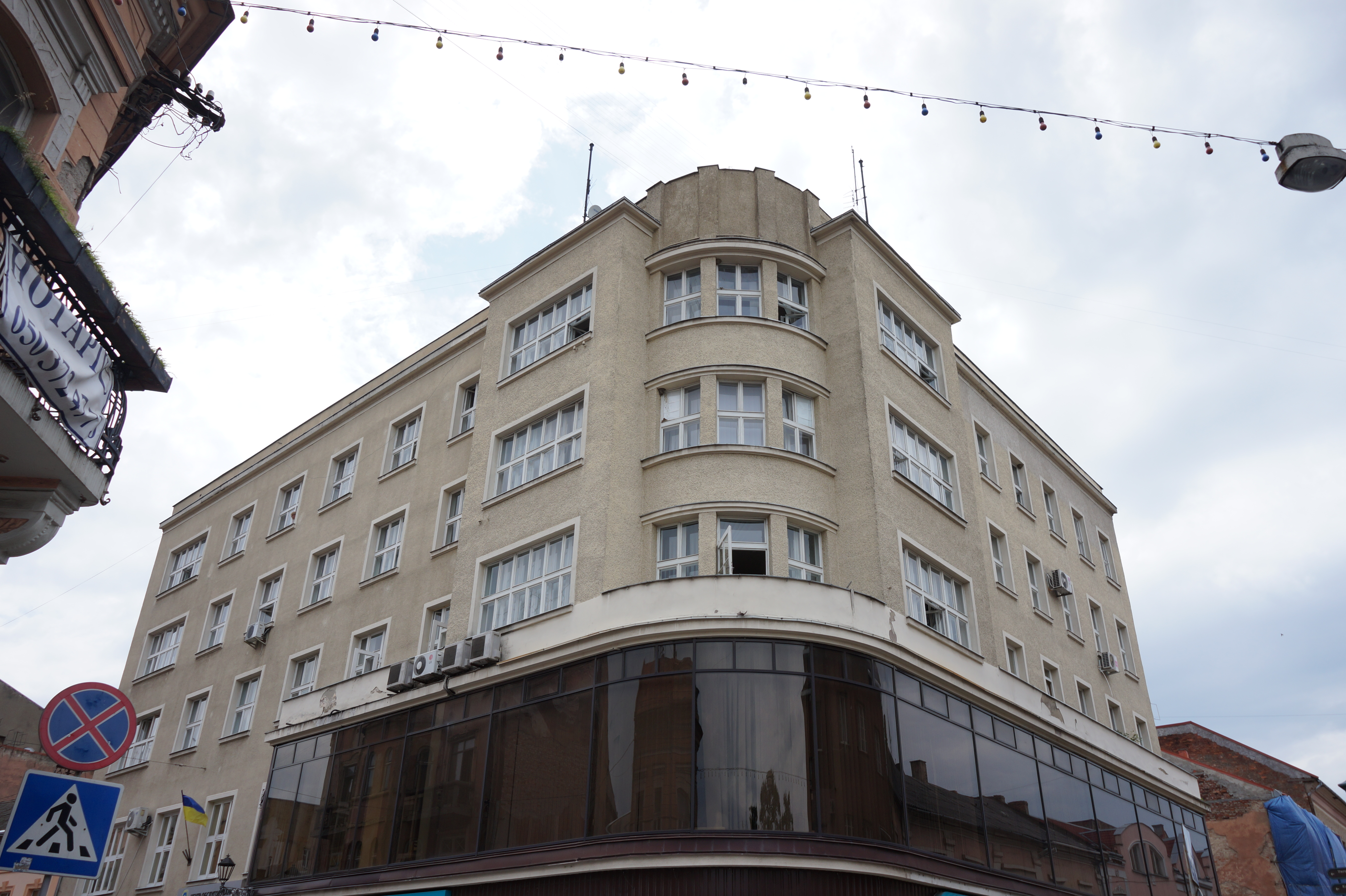 Колишній будинок ремісничого товариства «Легіо дружство» (нині податкова адміністрація), Ужгород, вул. Духновича, 2